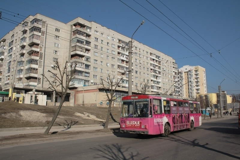 Троллейбус во Львове